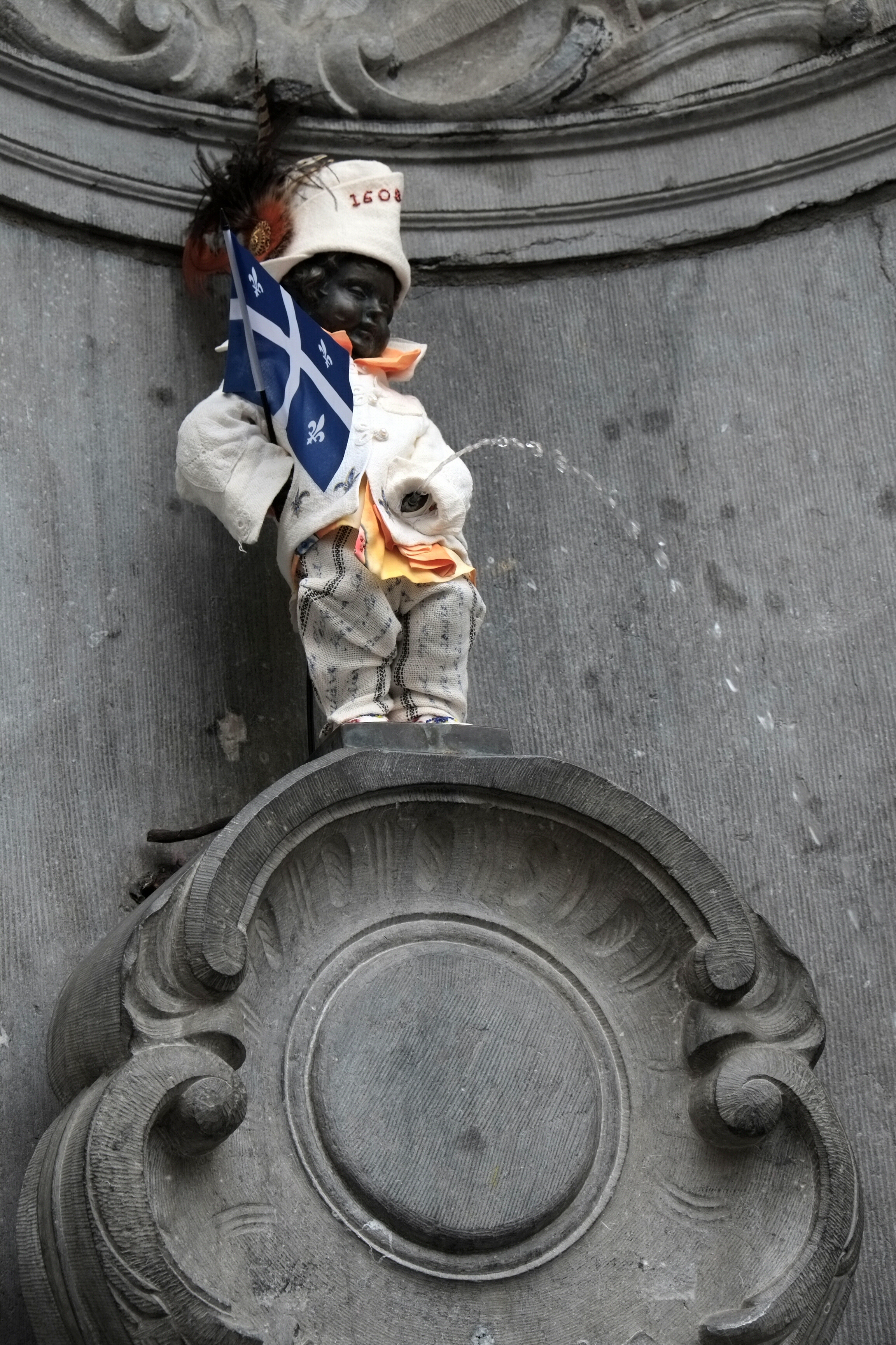 Manneken-Pis à Bruxelles, Belgique. Costume de Québequois à l'occasion de la Fête nationale du Québec